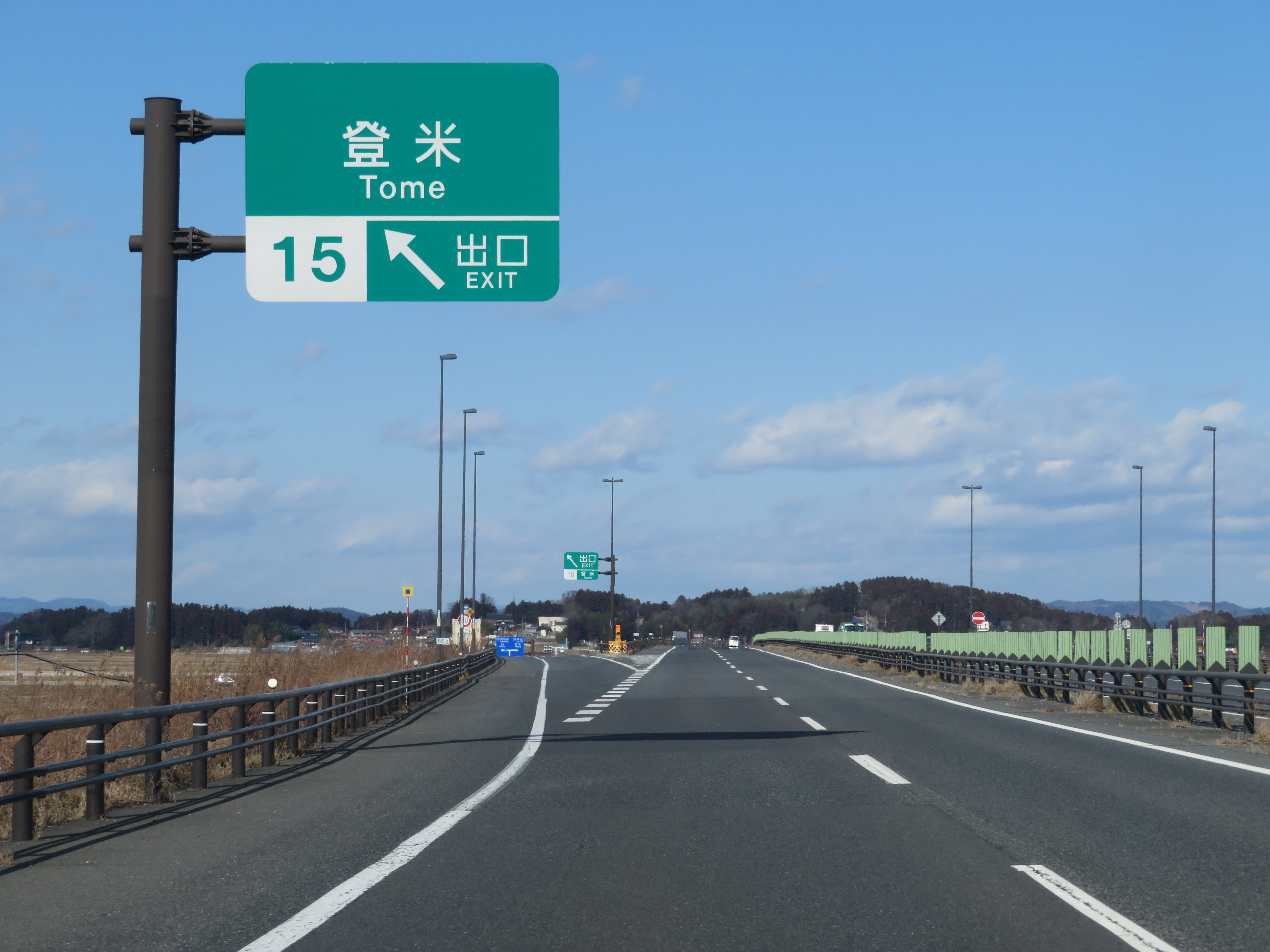 三陸自動車道登米インターチェンジ（気仙沼方面側出口付近） Canon PowerShot SX720 HS